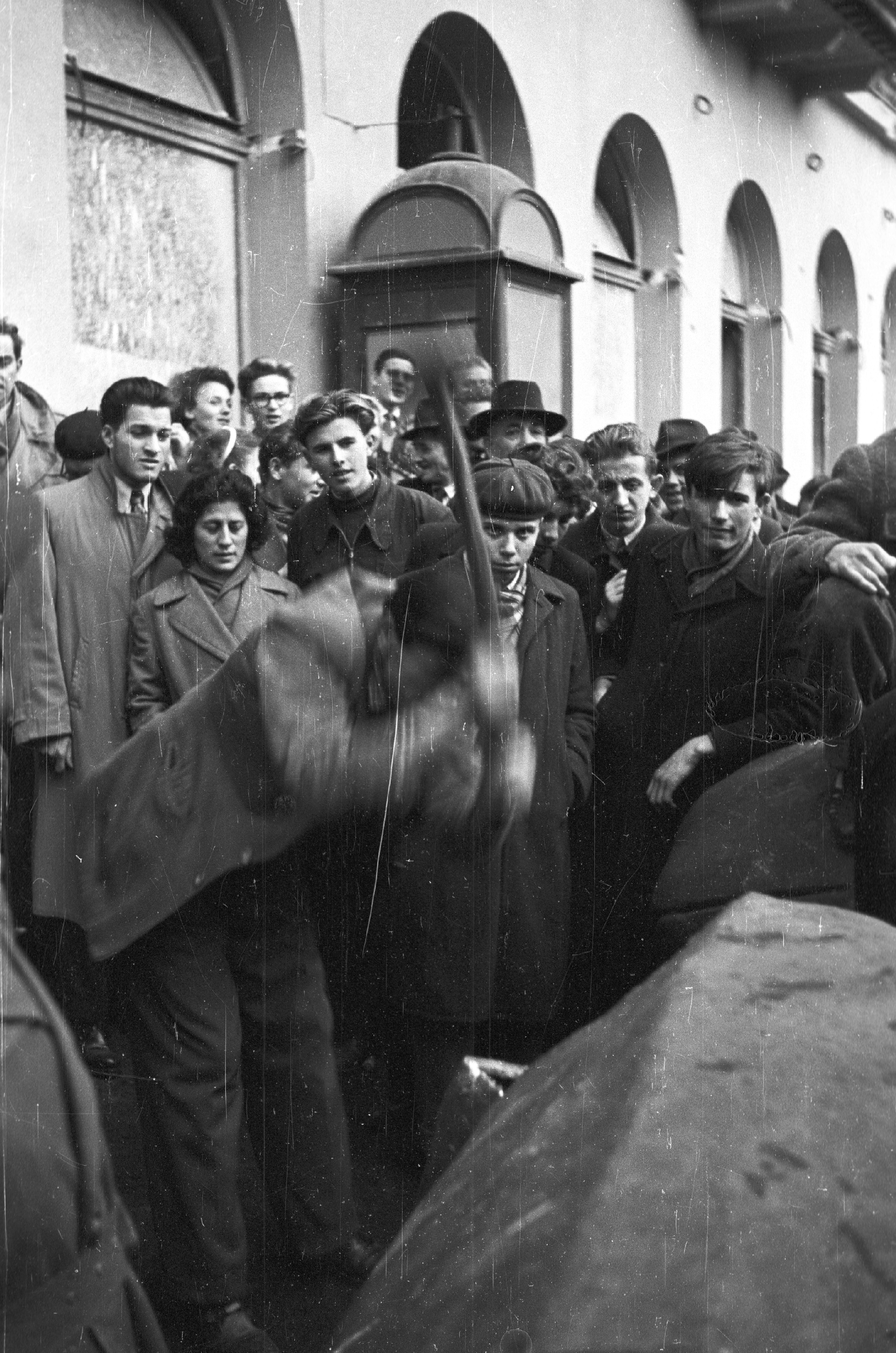 Akácfa utca Rákóczi út felé nézve, folyik a Sztálin szobor szétdarabolása. Location: Hungary, Budapest VII. Tags: phone booth, sculpture, destruction of symbols, mass, Budapest, revolution Title: Akácfa utca Rákóczi út felé nézve, folyik a Sztálin szobor szétdarabolása.